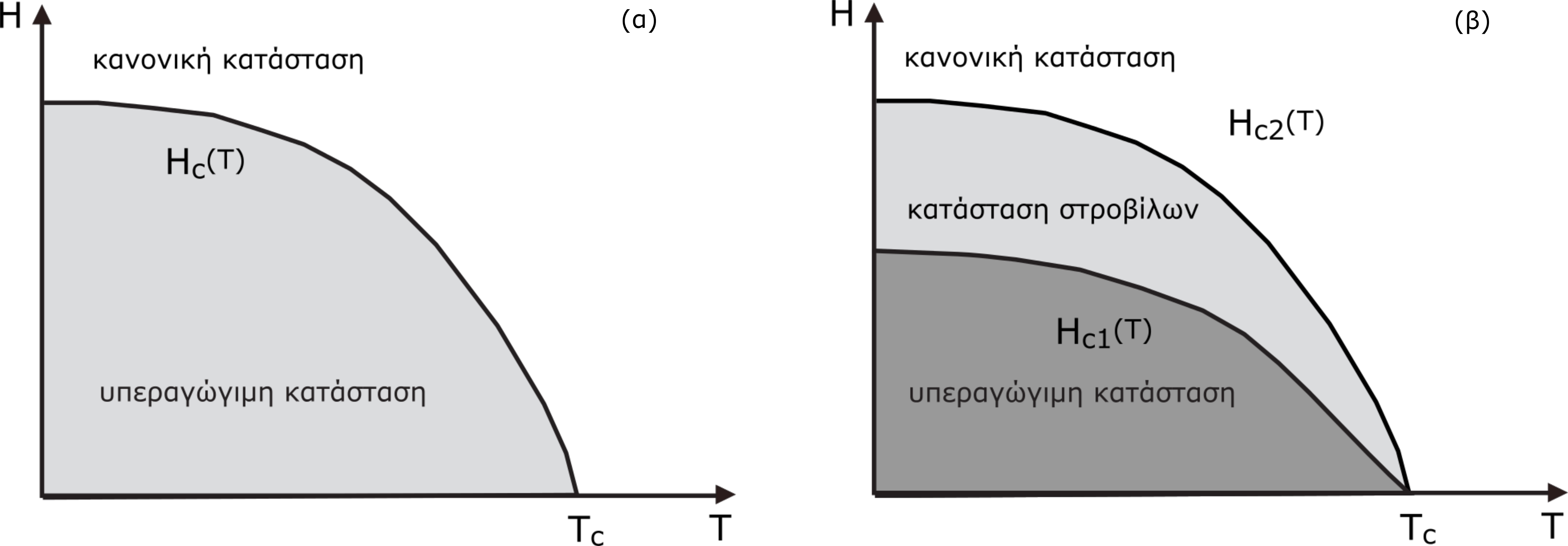 κρίσιμο μαγνητικό πεδίο συναρτήσει της θερμοκρασίας για υπεραγωγους τύπου Ι,ΙΙ